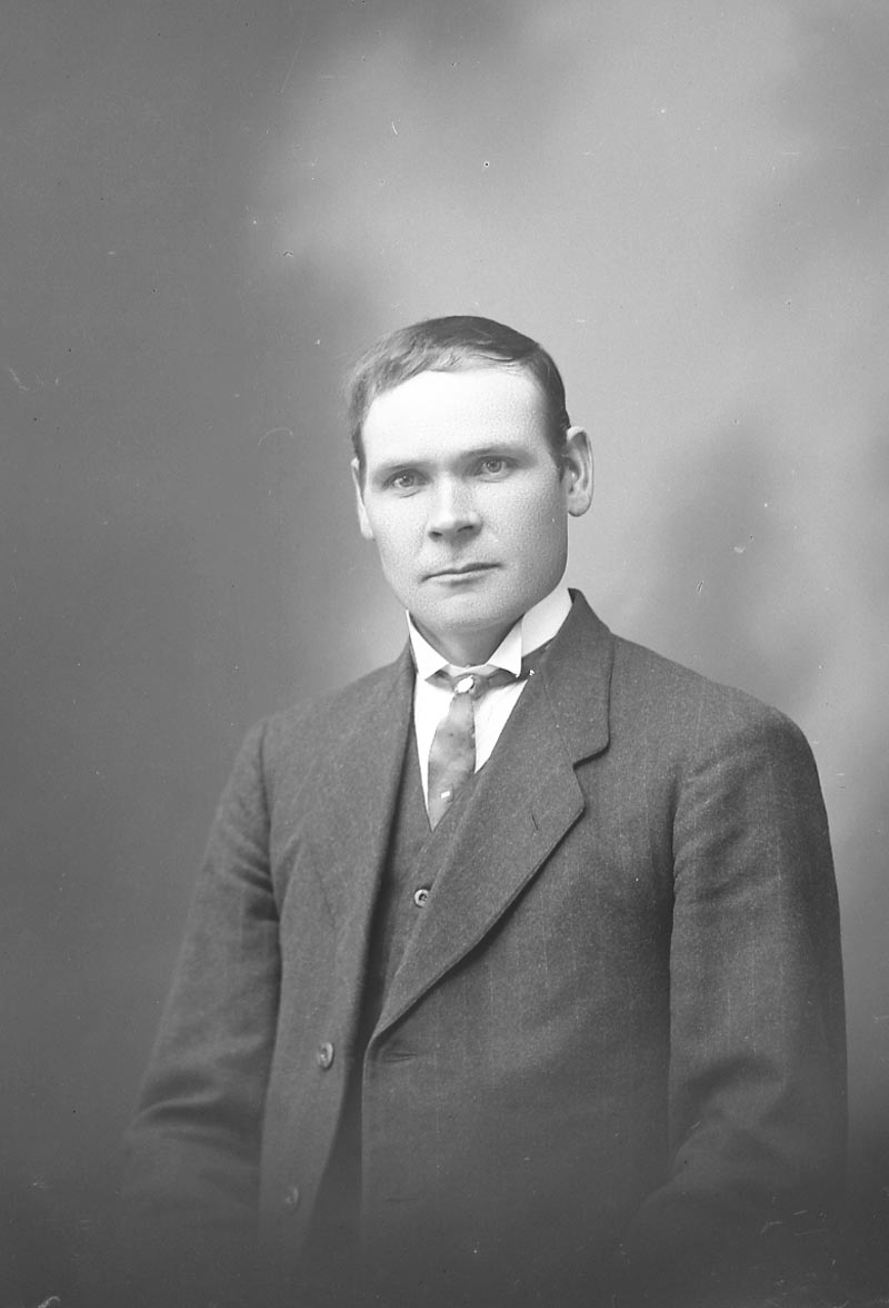 Porträtt av fotografen Erik Hägglund, 1919. Finns i SLS arkiv, ÖTA 135 (SLS 865) Erik Hägglunds fotosamling.